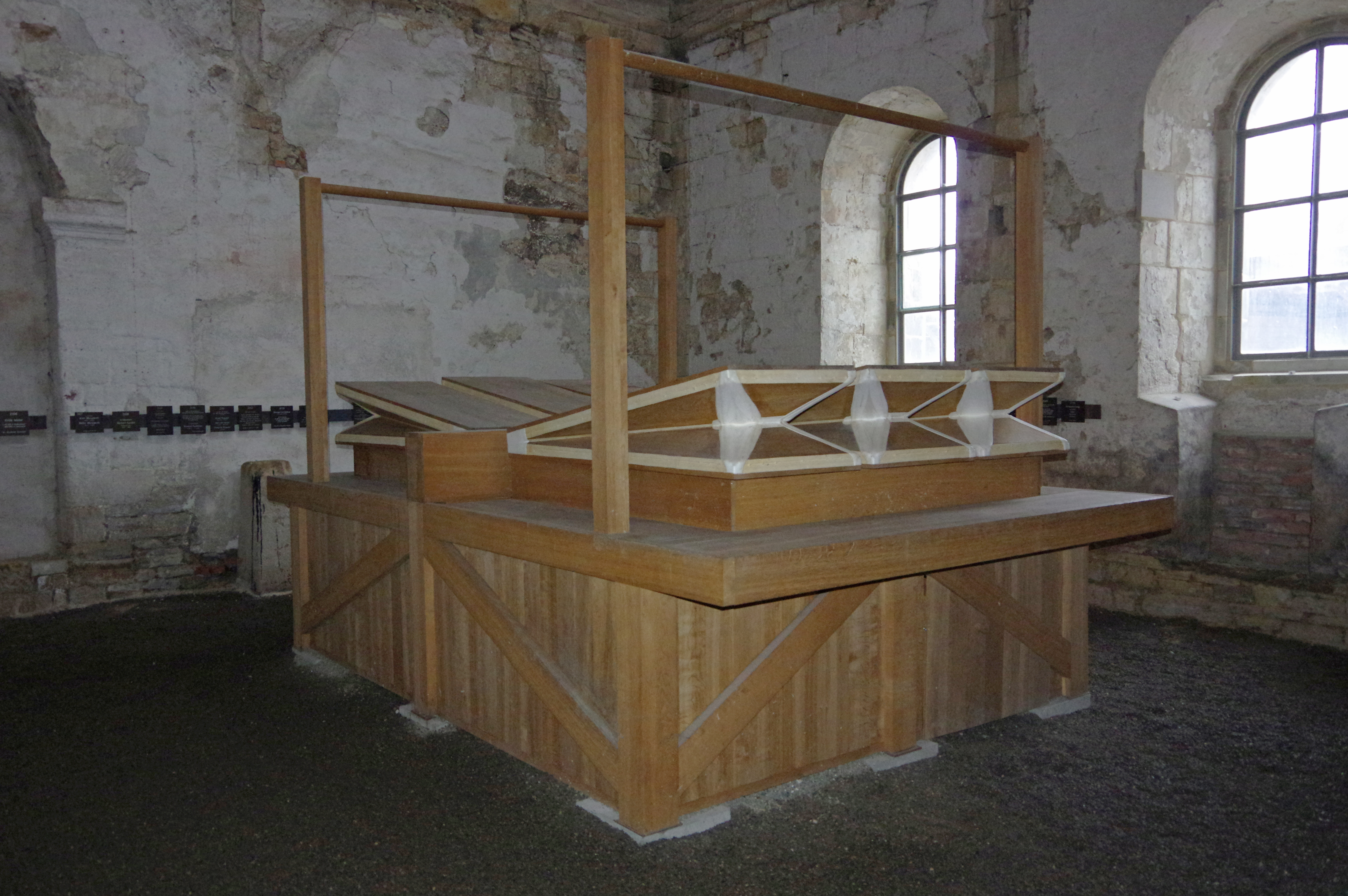 Halberstadt in Sachsen Anhalt. Die Balganlage in der Kirche St. Burchardi mit dem Orgel Projekt von John Cage.